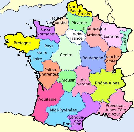 Frankrijk met gekleurde regio's en regionamen.